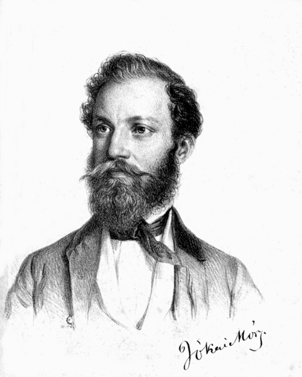 Jókai Mór